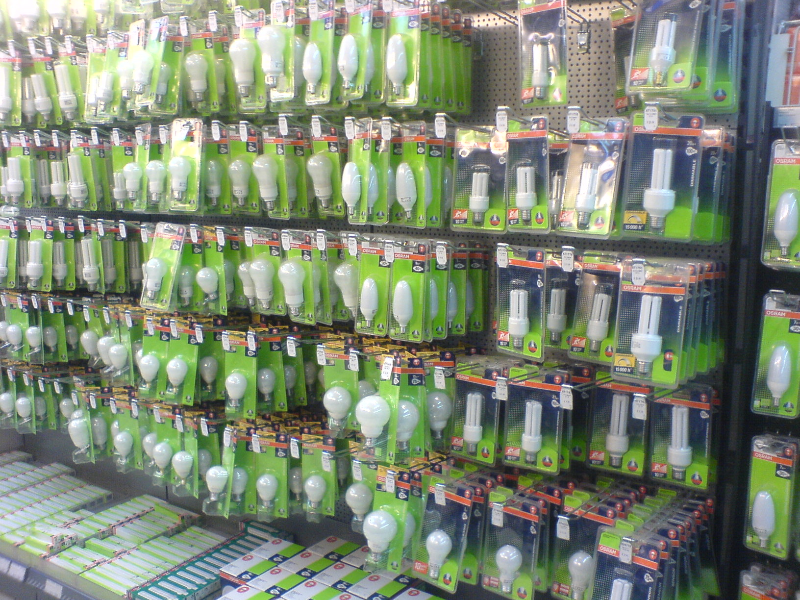 Energy saving light bulbs for sale.